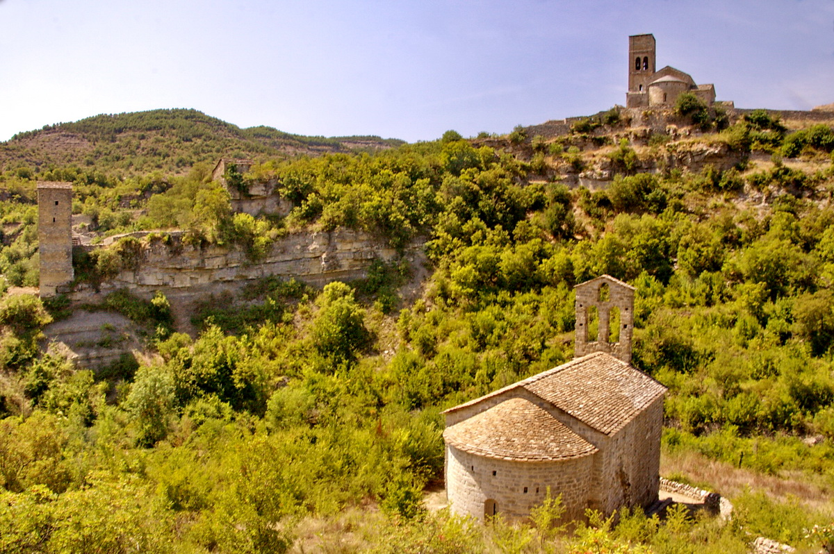 Vista de l'ermita de Sant Joan i al fons la Mare de Déu de Baldós i una torre de guaita medieval a Montanyana (la Franja-Osca)